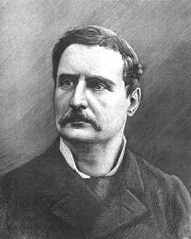 "M. Hovelacque".